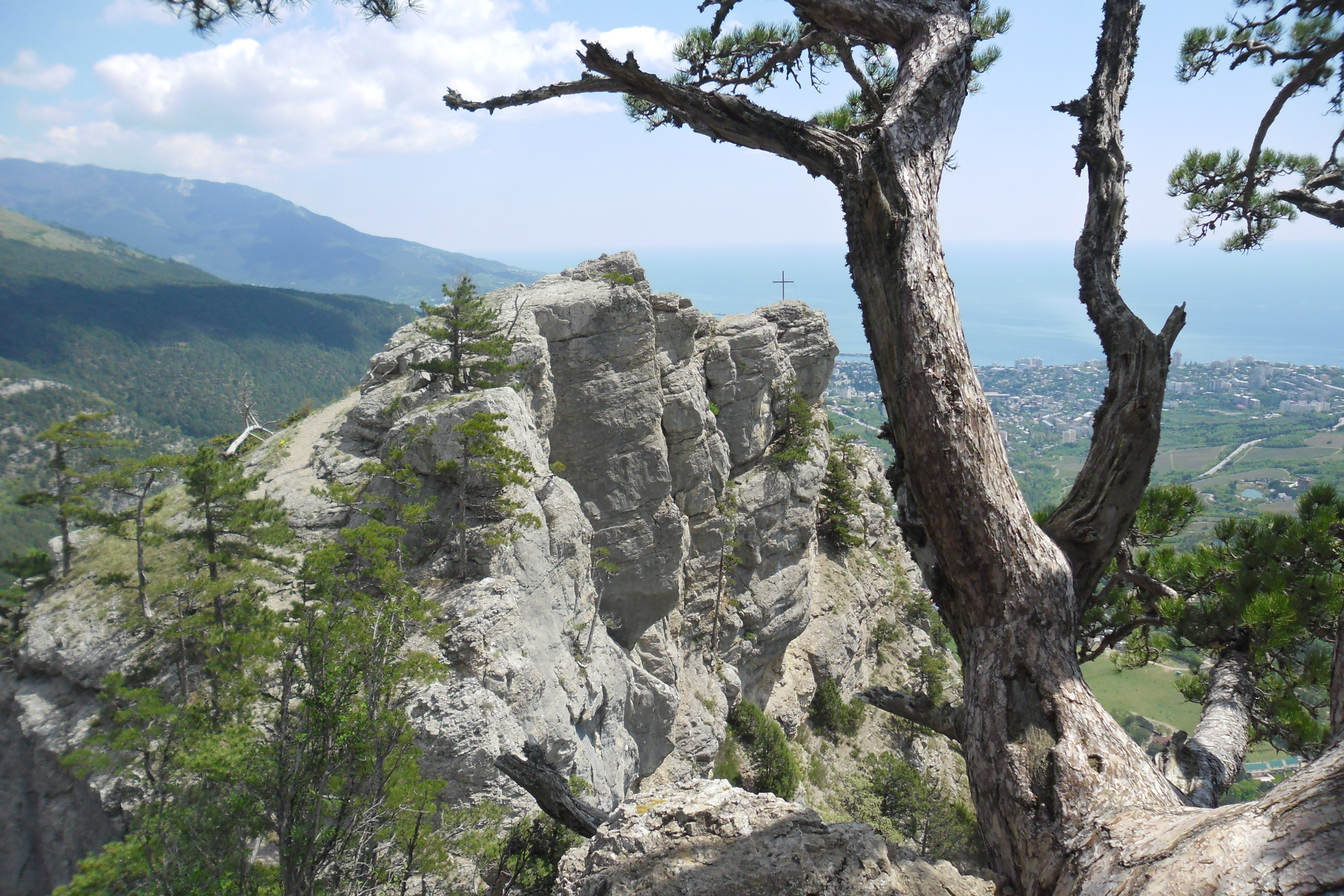 Ставрі-Кая